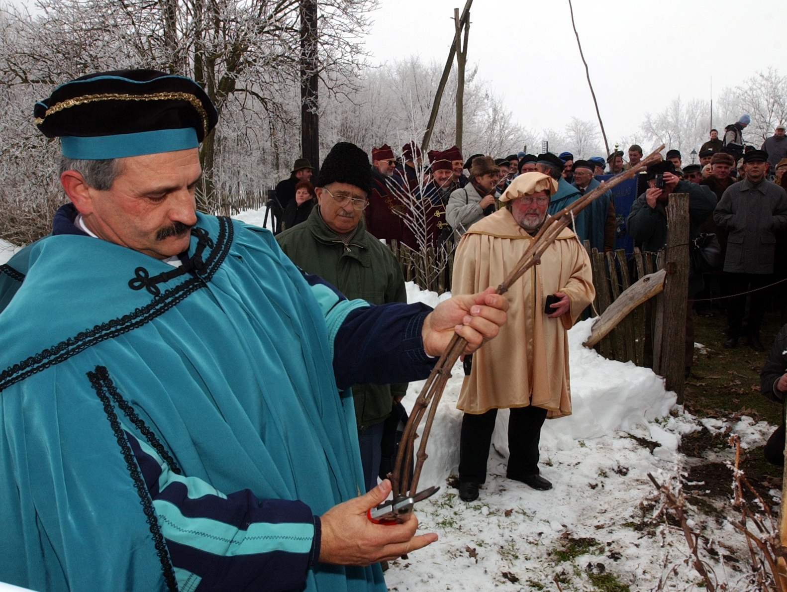 Vince-napi vesszővágás 2009.